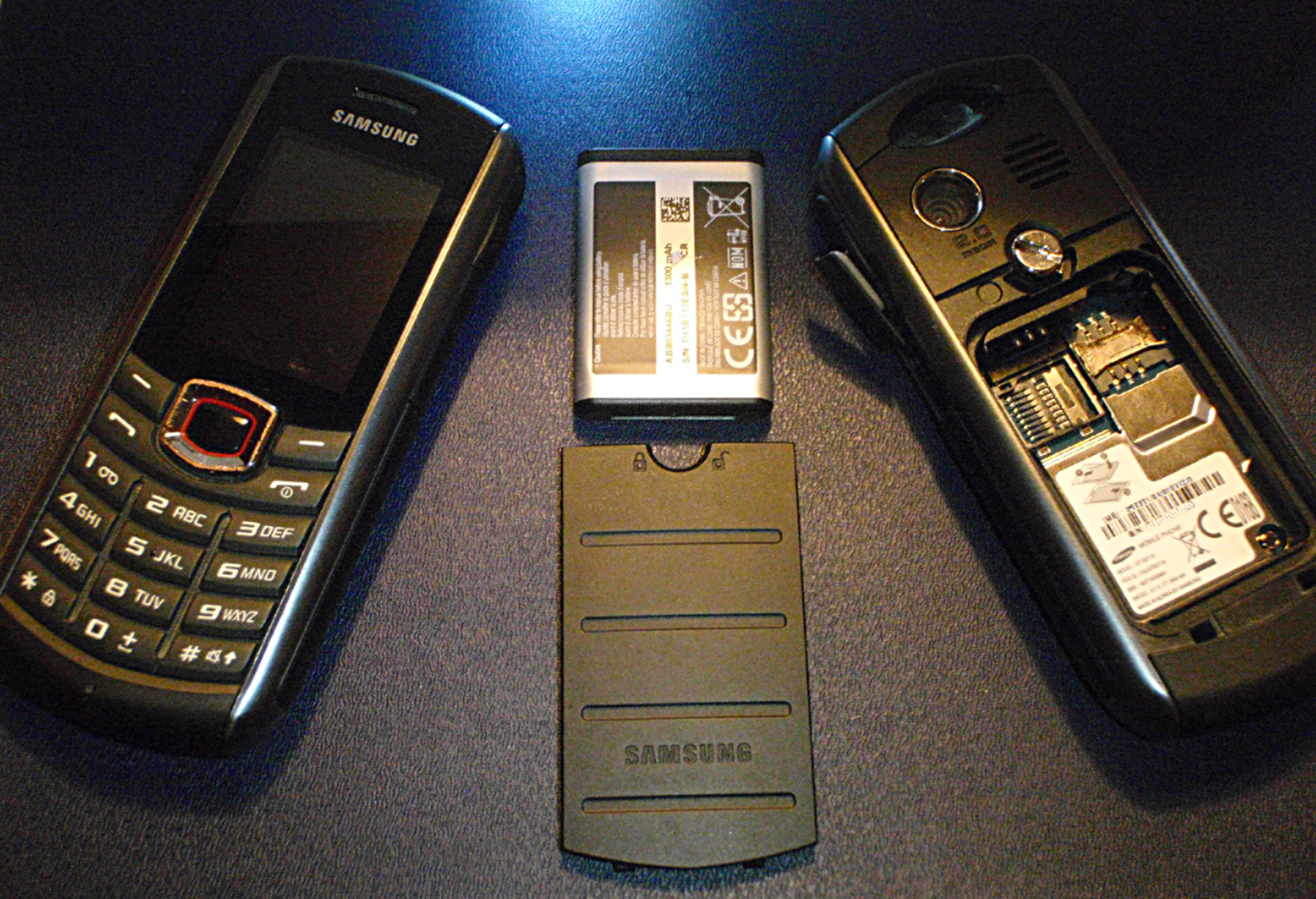 Samsung GT-B2710, mujal võidakse kirjelduses kasutada ka nime Samsung Xcover 271